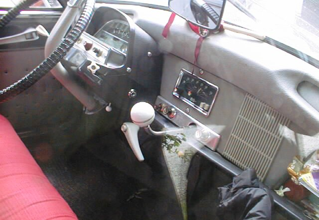 Intérieur d'une Citroën Ami 6. Les spécialistes reconnaitront le poste de radio spécifique à ce modèle, et la boule en ébonite blanche avec le jonc chromé du modèle le plus luxueux.